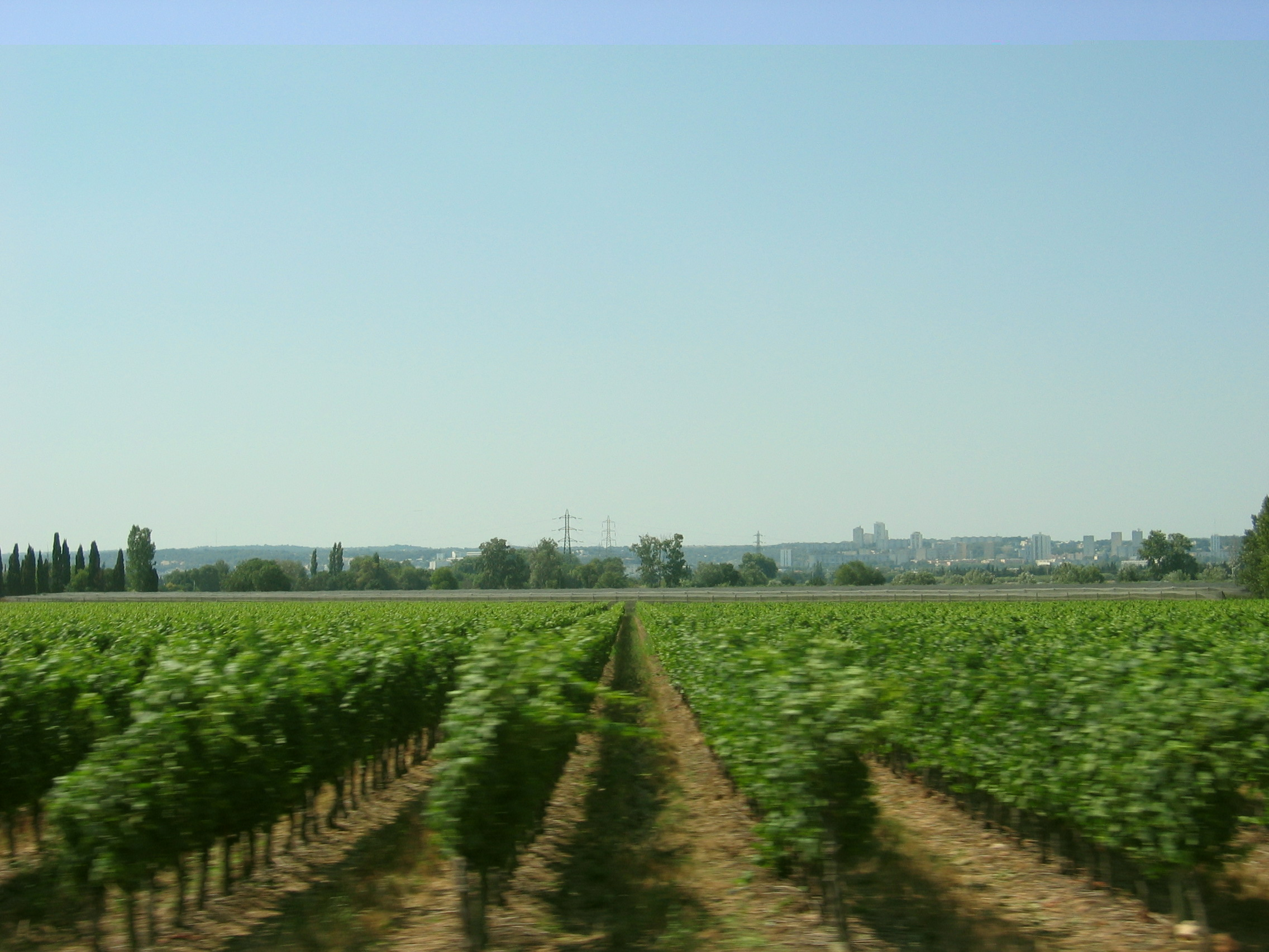 Des vignes en bordure de Nîmes, photo de Nicolas Cadène. Propre travail, libre de droits (domaine public).